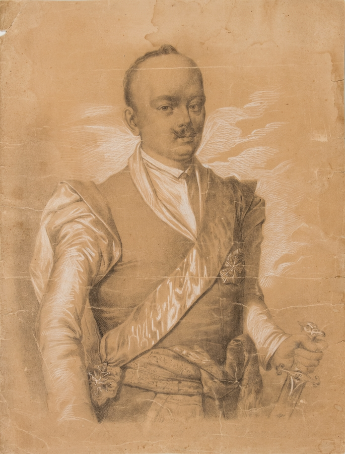 Беларуская (тарашкевіца): Партрэт Тадэвуша Францішка Агінскага (Tadevuš Francišak Aginski)